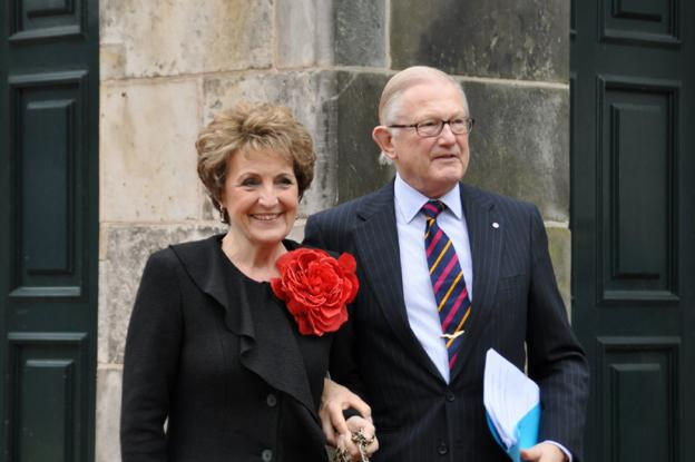 Afscheid mr. Pieter van Vollenhoven als voorzitter van de Onderzoeksraad voor Veiligheid; samen met zijn echtgenote prinses Margriet